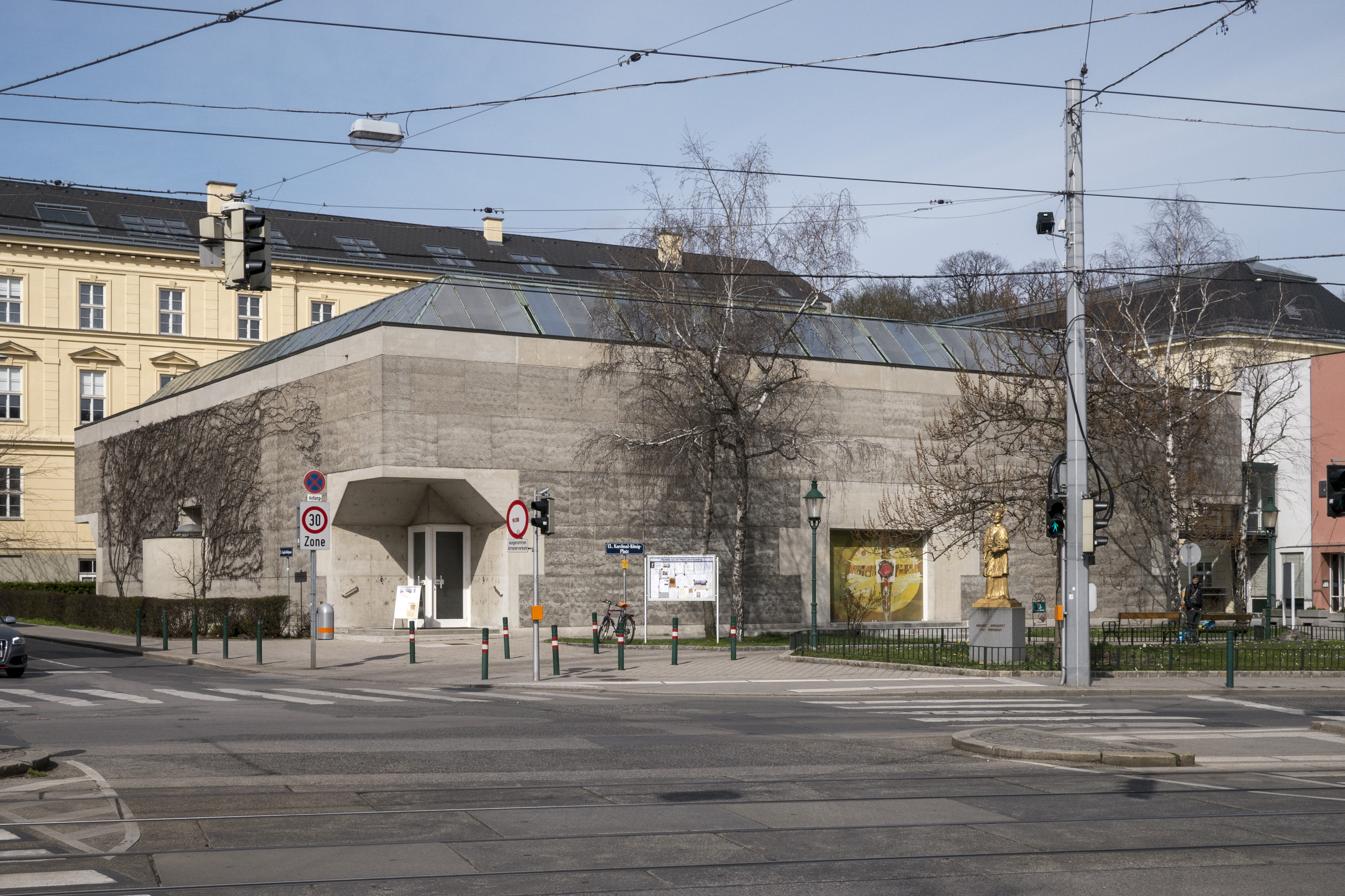 Konzilsgedächtniskirche Hl. Ignatius von Loyola